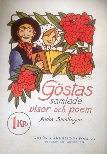 Göstas samlade visor och poem by Gösta [Gustaf Schönberg]. Book cover.